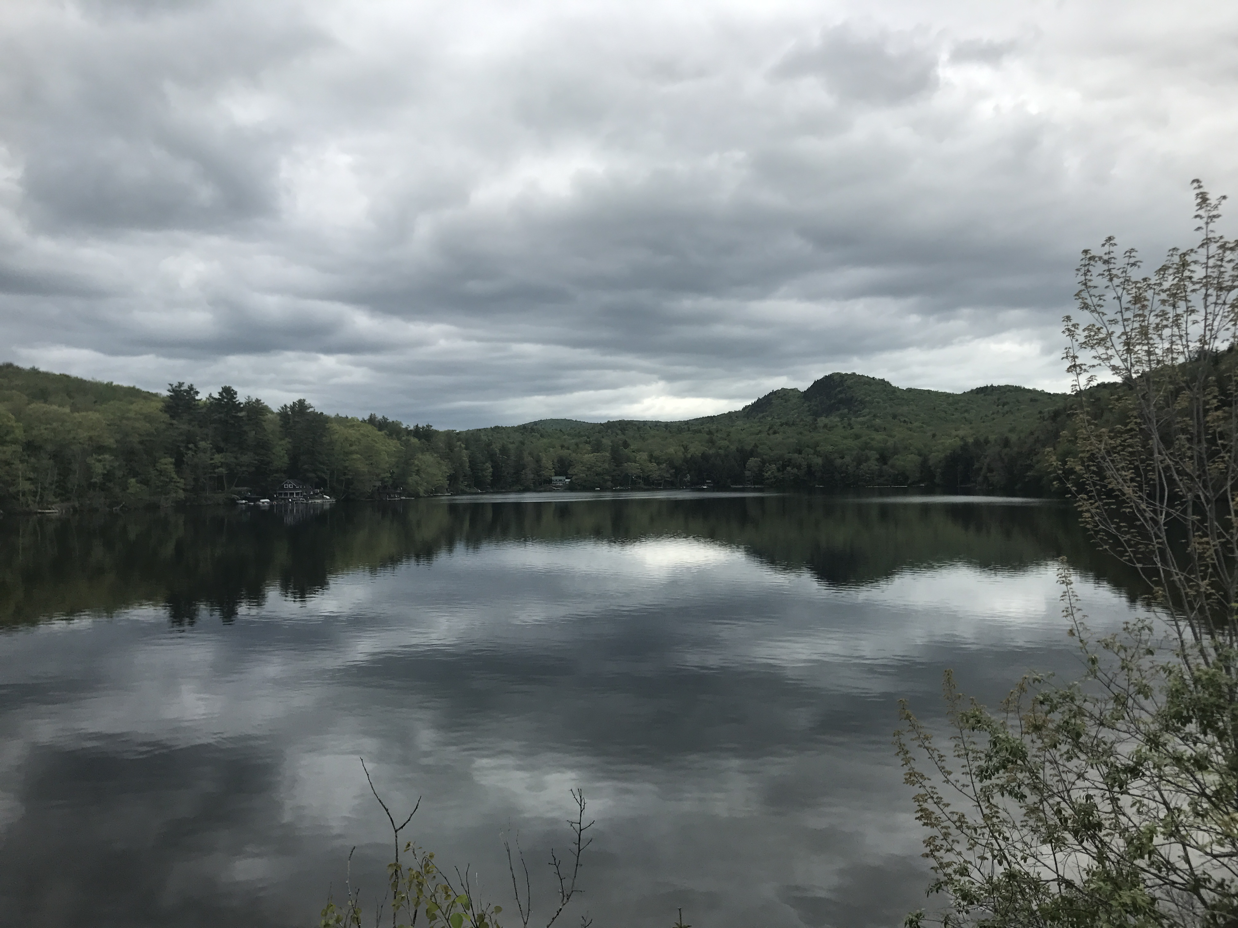 Green lake Canada lake